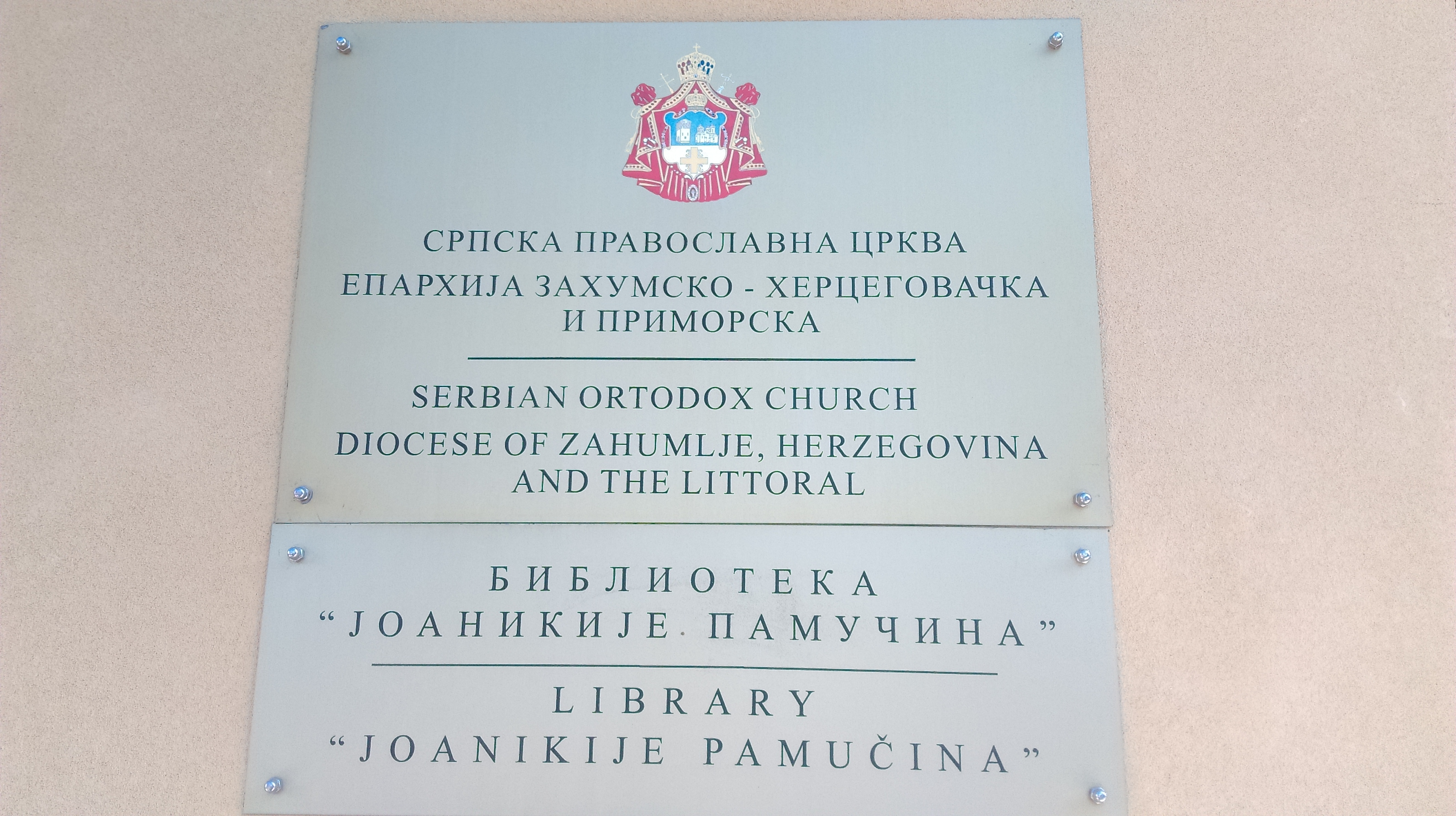 Табла која се налази на улазу у Владичански двор у Мостару, гдје је и смјештена библиотека.